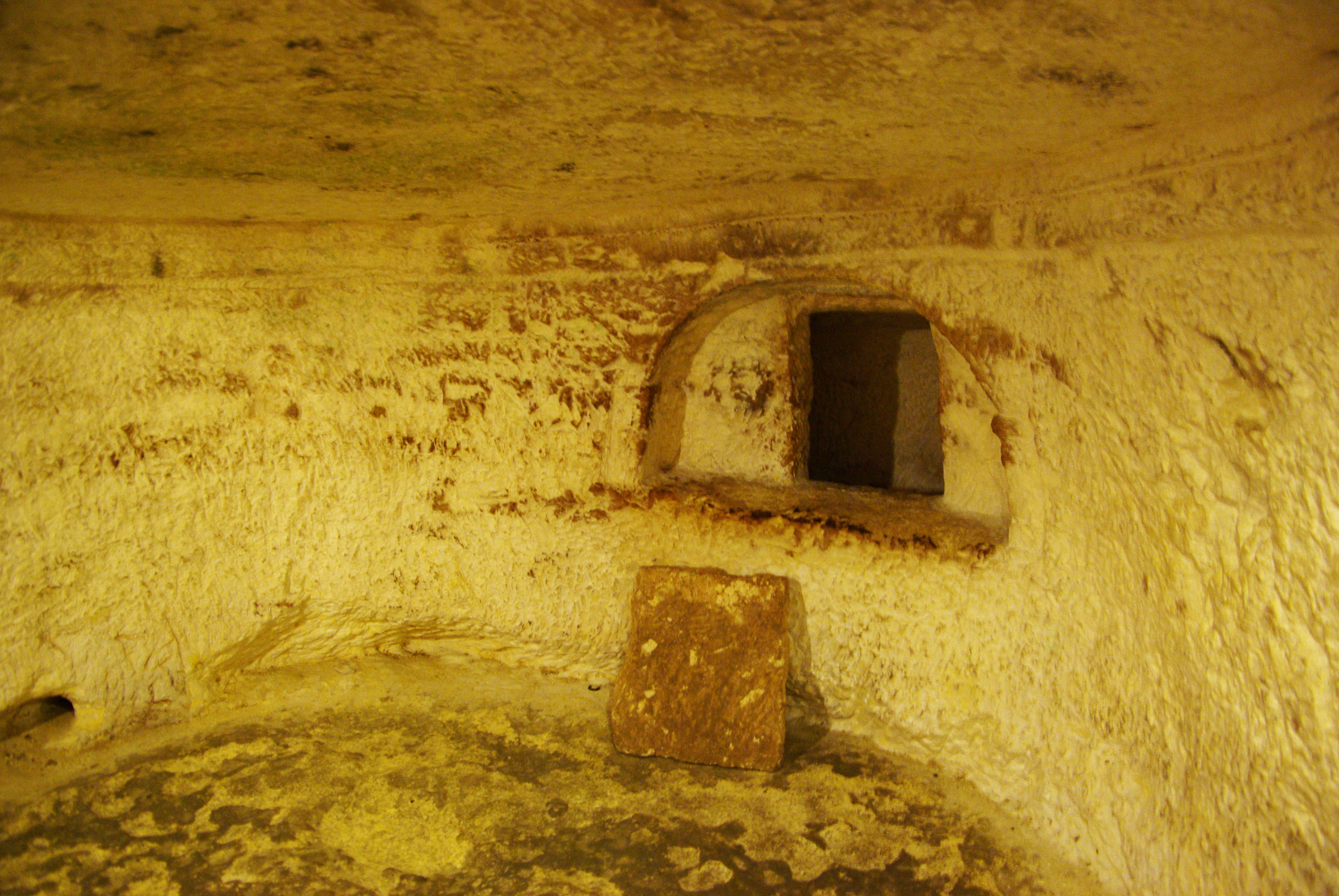 Malta, Rabat, St. Agatha Katakomben